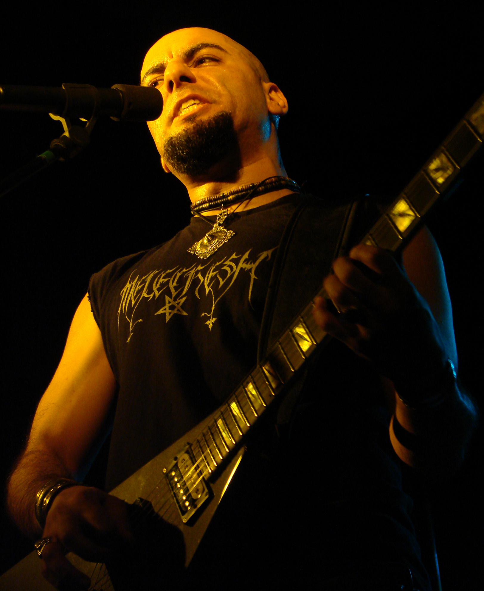 Melechesh au Chaulnes Fest, le 22/03/08: Ashmedi.